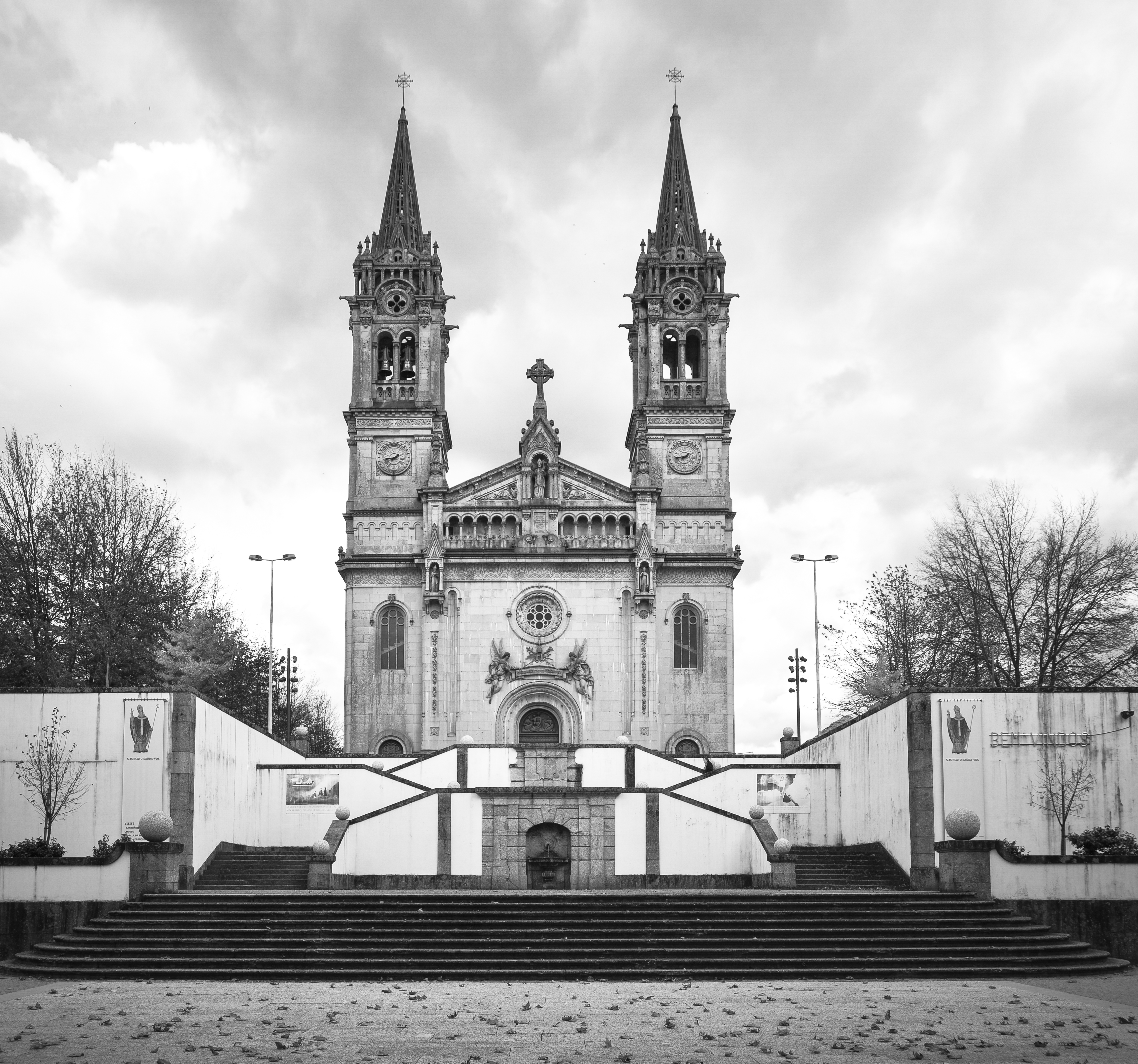 São Torcato